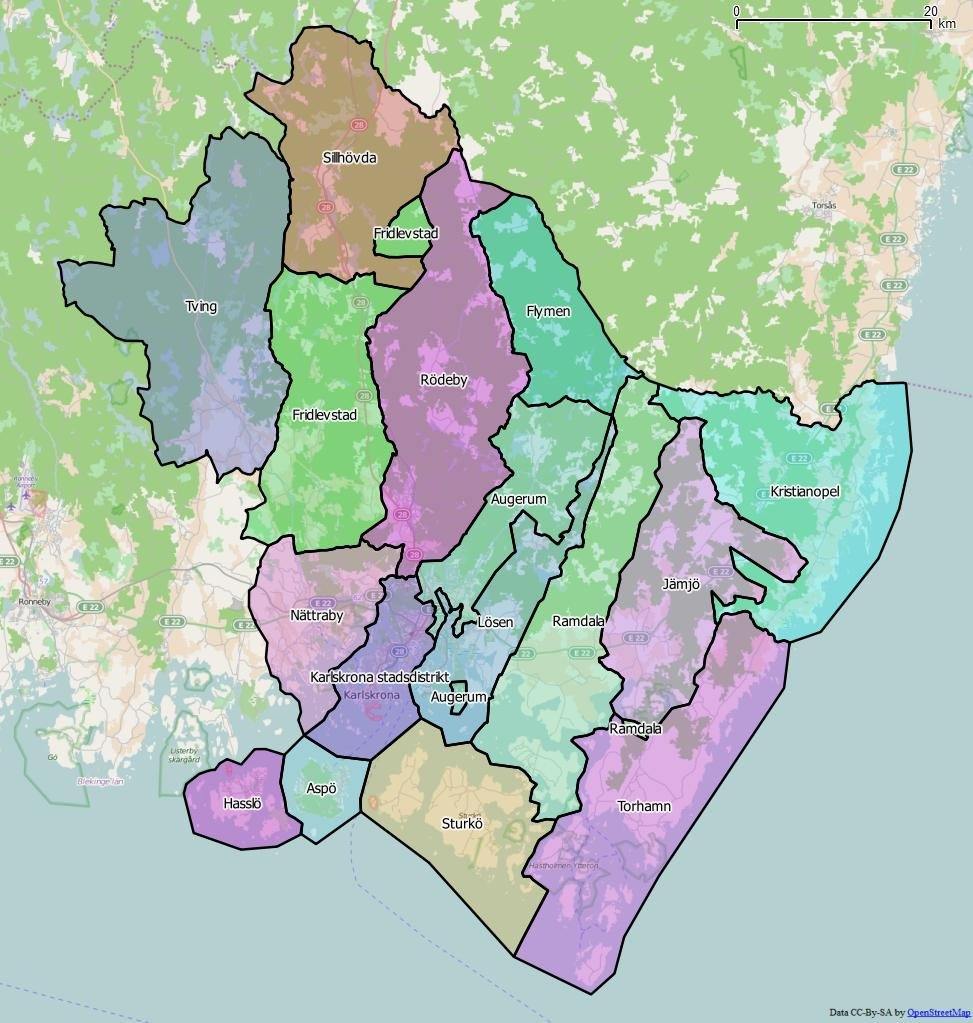 Distriktsindelningen i Karlskrona kommun World file: 102.57719755026339215 0 0 -102.57719755026339215 1696981.39140098541975021 7661936.06762339267879725